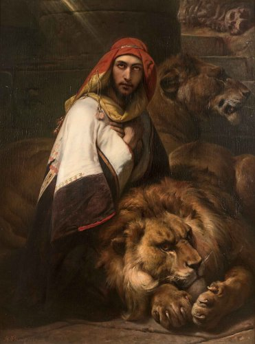 Huile sur toile - 147 x 114,5 cm Photo : Tajan